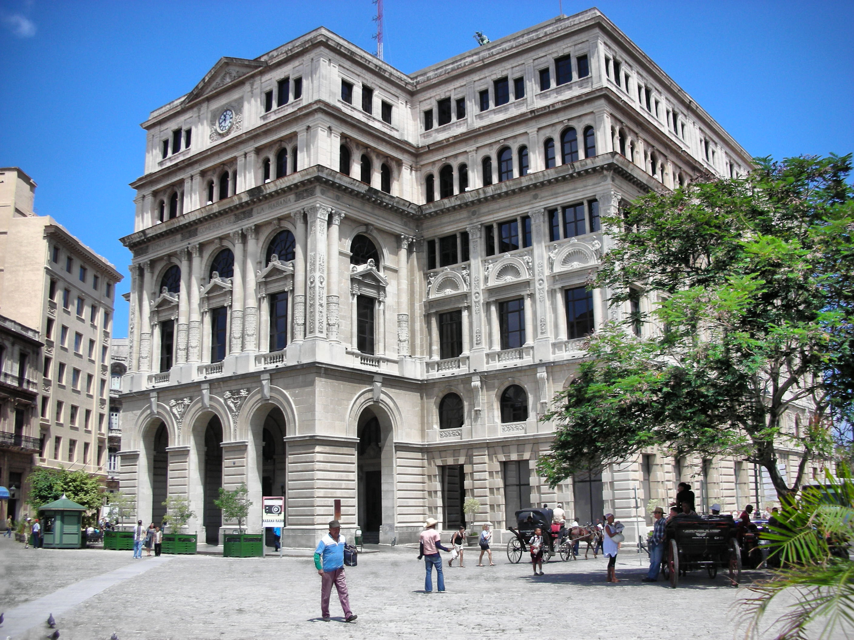 Lonja del Comercio, Plaza de San Francisco - 2008